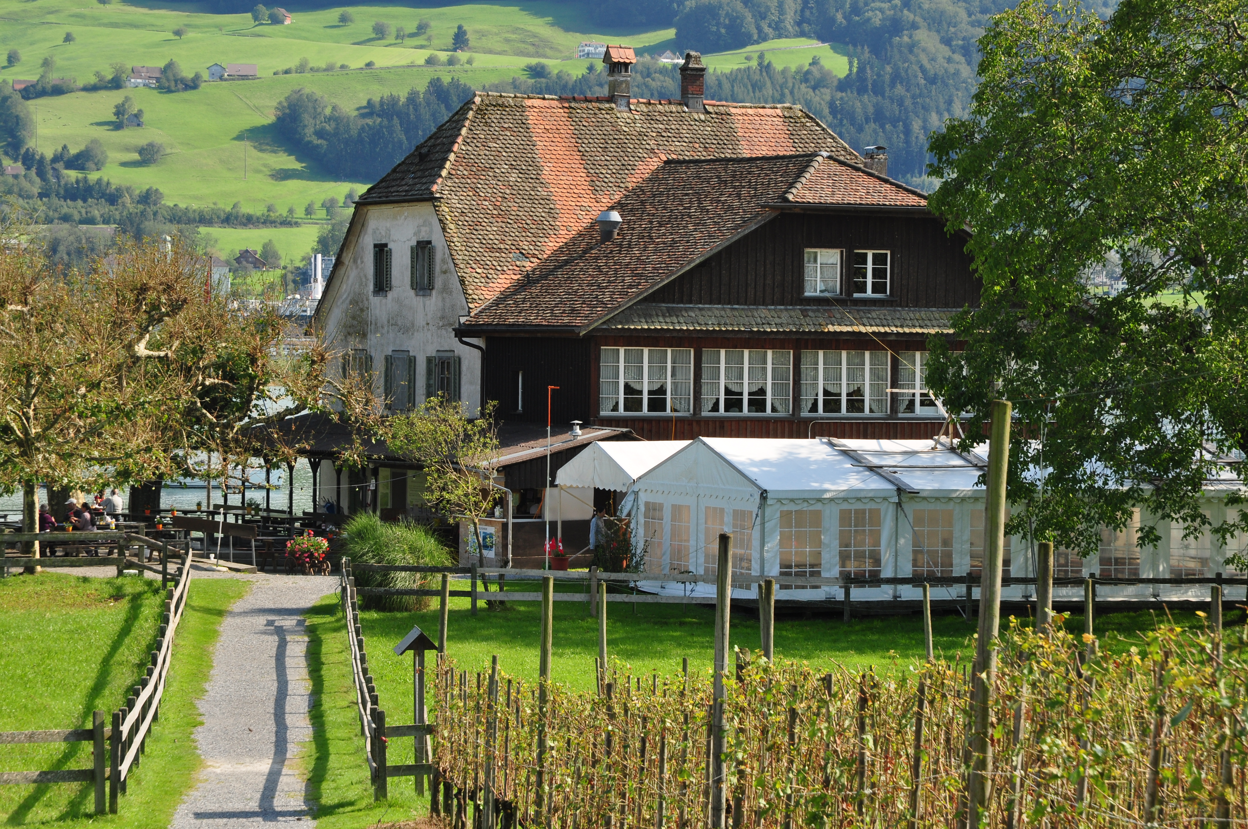 Gasthaus Insel Ufenau on Zürichsee (Lake Zürich) in Switzerland